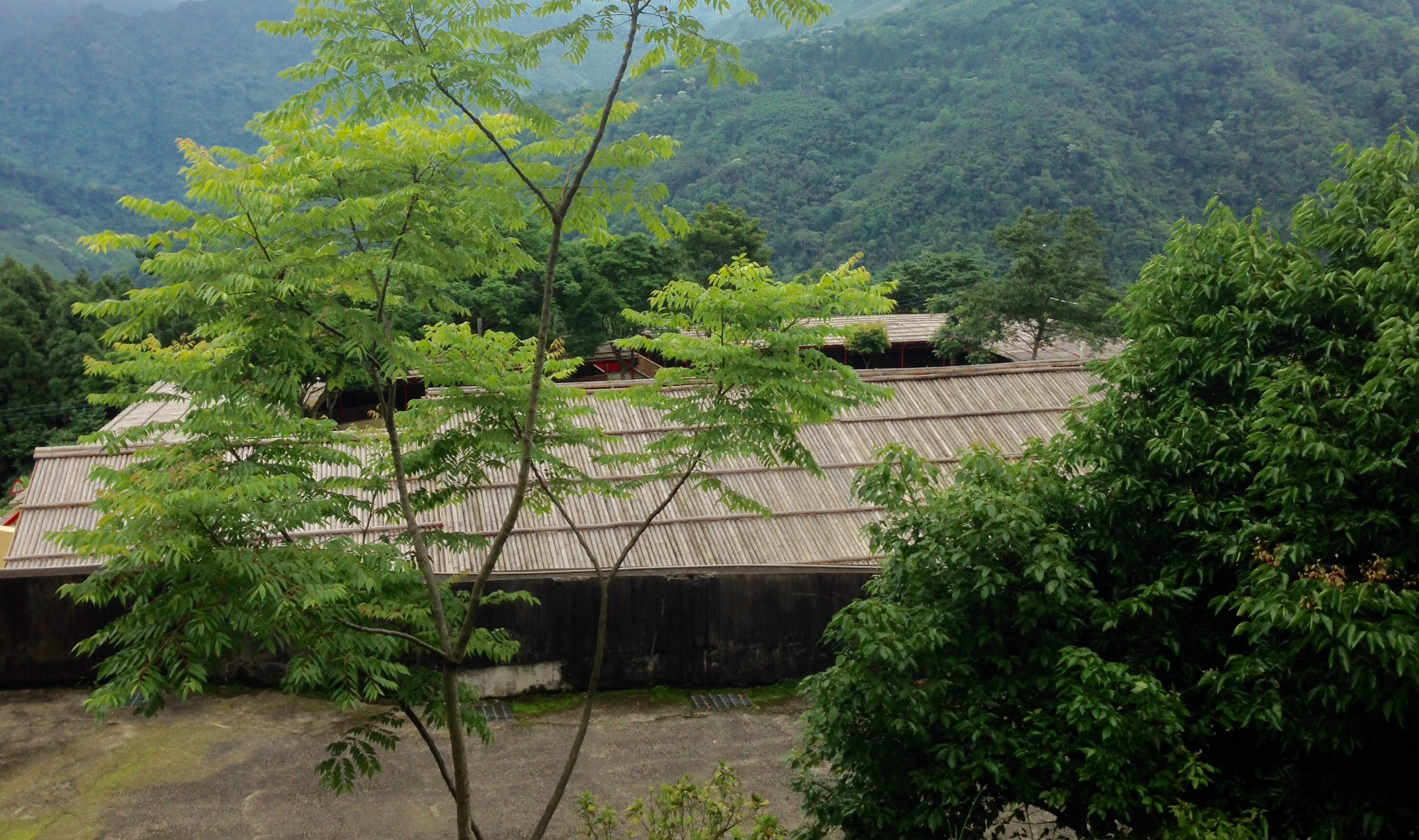 中文（台灣）: 五峰鄉大隘村矮靈祭場